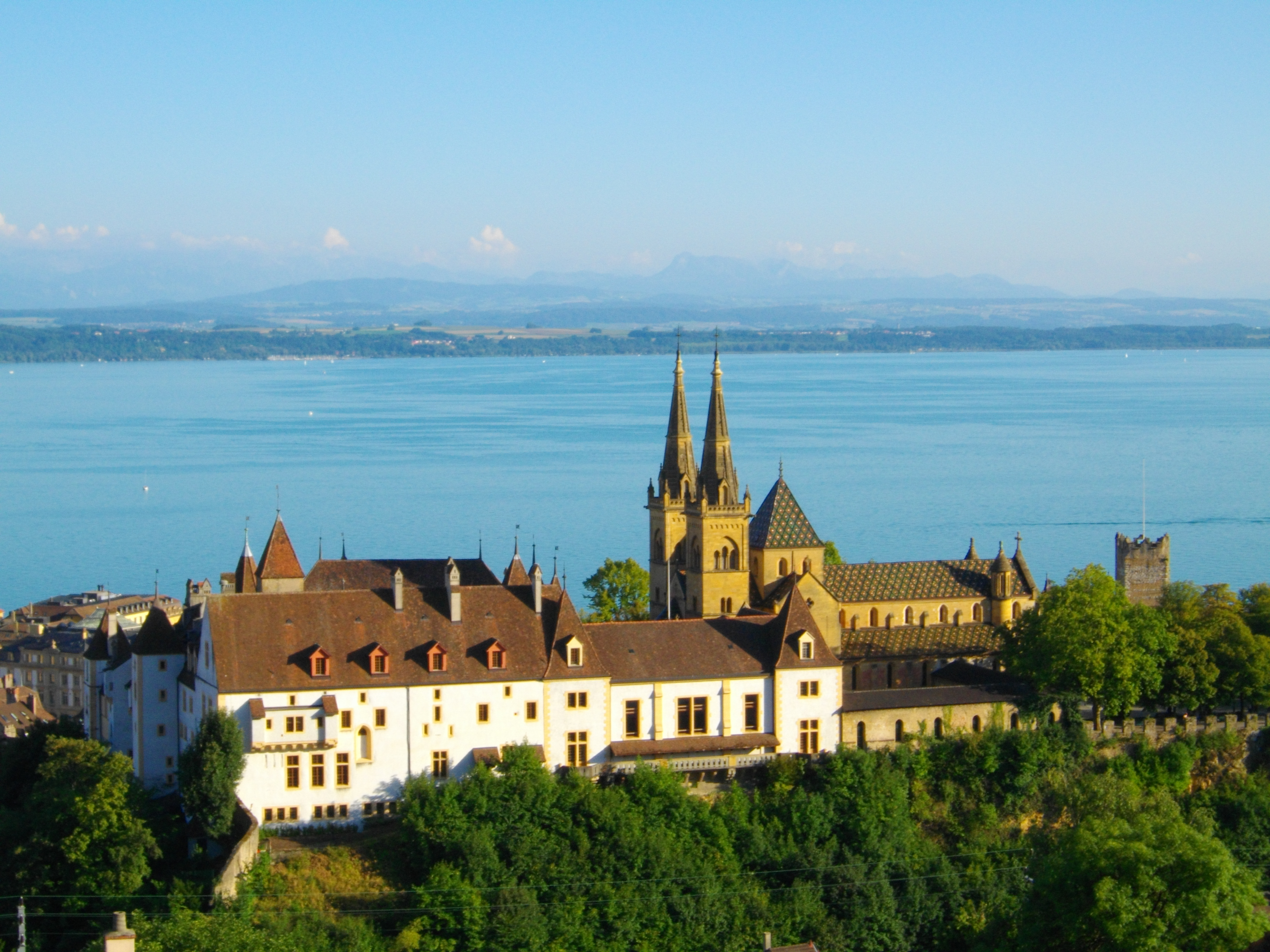 Eglise collégiale de Neuchâtel, vue depuis le haut de la ville.